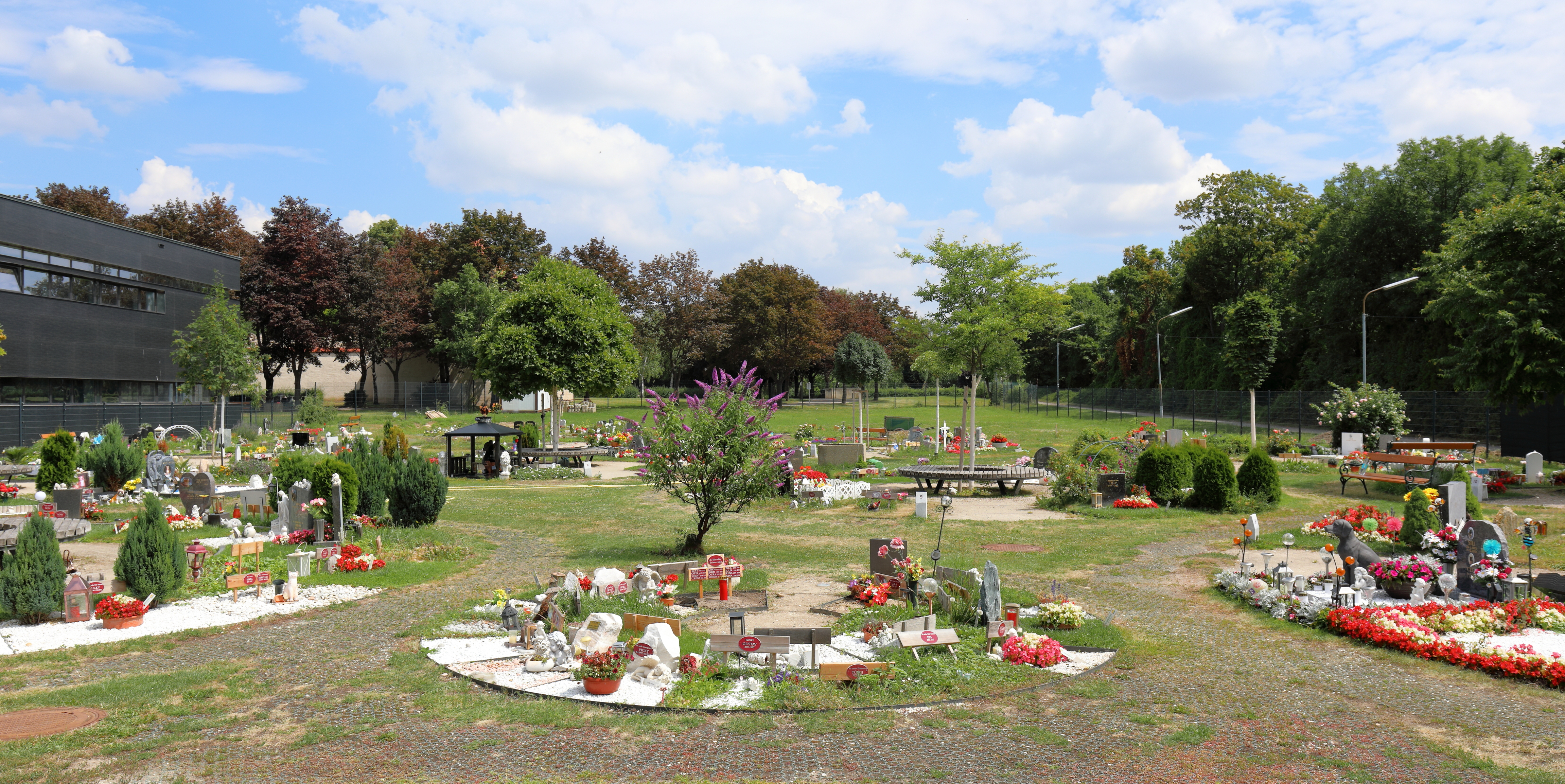 Der Tierfriedhof gegenüber dem Haupttor (Tor 2) des Zentralfriedhofes in der Anton-Mayer-Gasse im 11. Wiener Bezirk Simmering. Der erste und einzige Tierfriedhof Wiens wurde 2011 eröffnet und wird von der „Tierfriedhof Wien GmbH“ betrieben, die wiederum zu 70% zur gemeindeeigenen Friedhöfe Wien GmbH gehört. Je 15% halten die „ebswien tierservice Ges.m.b.H.Nfg KG“ und die „Reiwag Gebäudeservice GmbH“. Auf 2.500 m² sind in kreisförmigen Gräberfeldern insgesamt mehrere hundert Erdgräber in verschiedenen Größen und Urnengräber beheimatet. Zur würdevollen Verabschiedung steht unter anderem eine Aufbahrungshalle zur Verfügung.